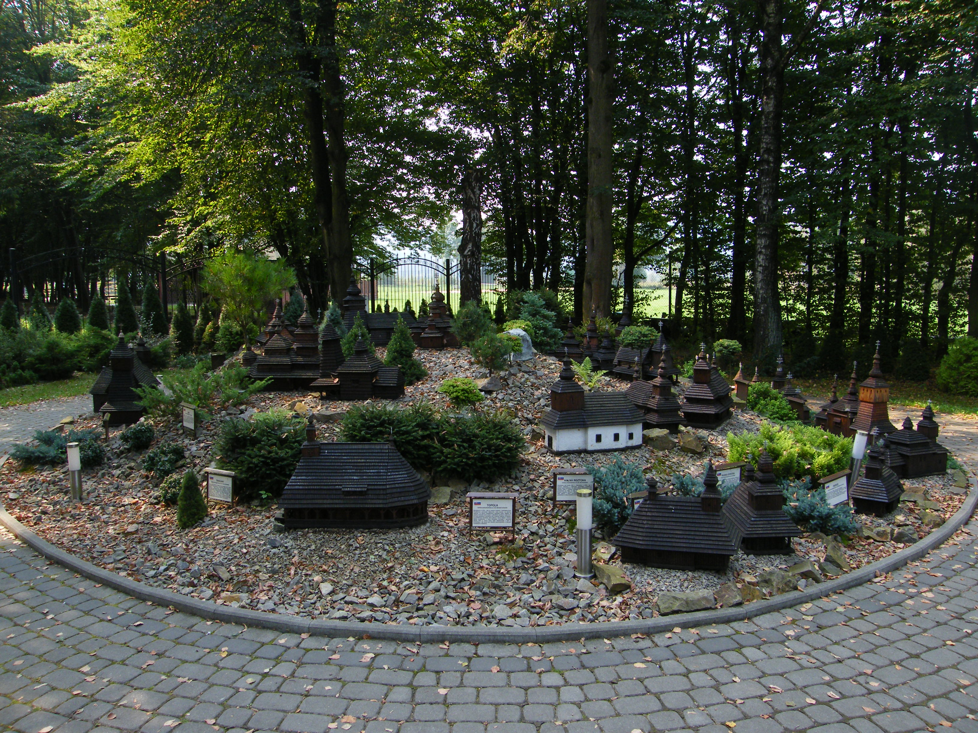 Park miniatur cerkwi w ośrodku Caritas w Myczkowcach